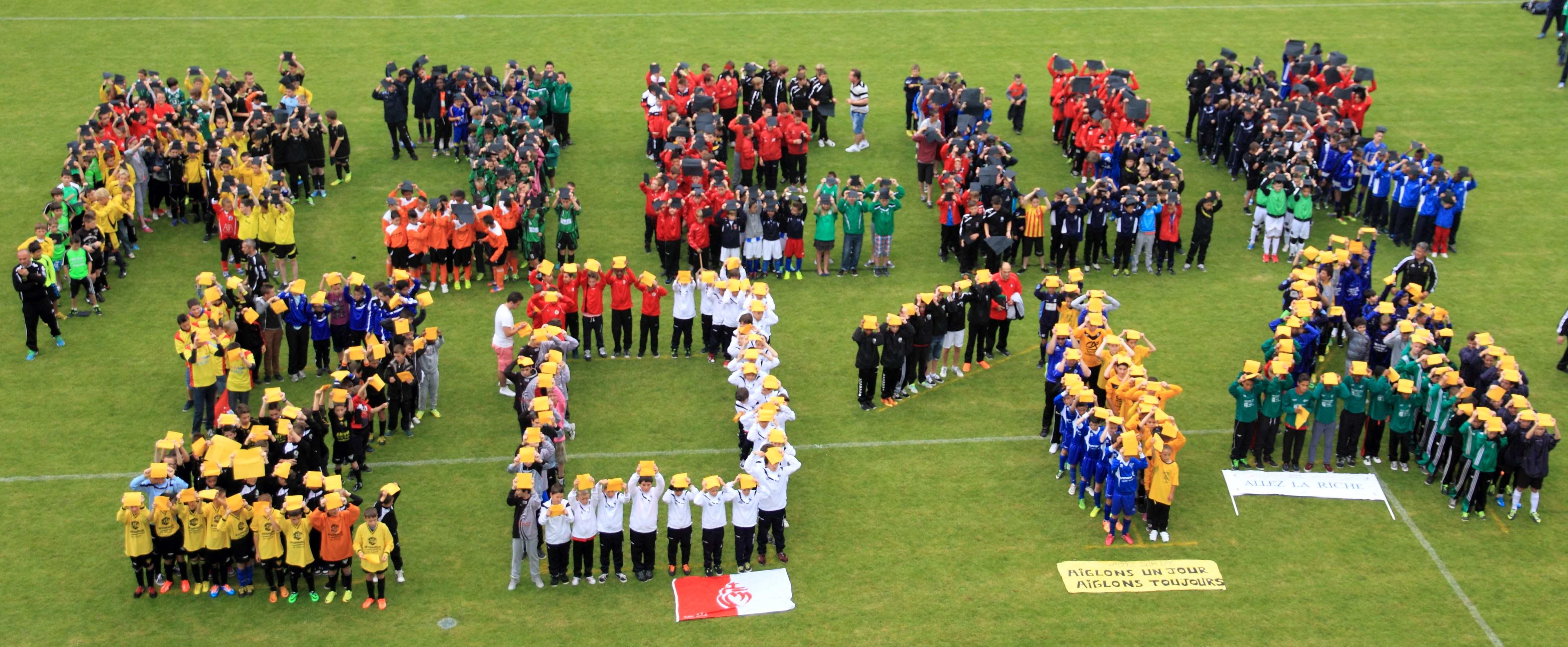 Photo du tournoi de football de bretagne U11 et U13 2014.